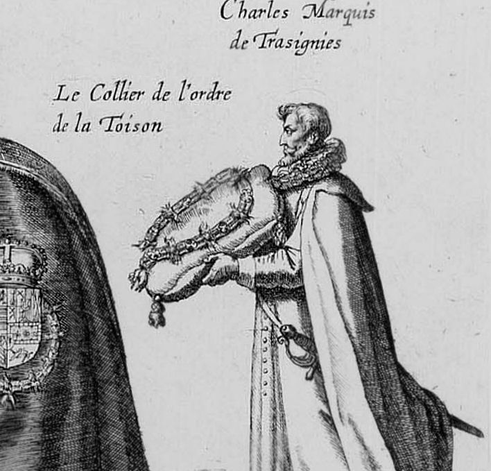 Pompes funèbres de l'archiduc Albert d'Autriche à Bruxelles / Série de 65 gravures d'un recueil relatant les funérailles d'Albert d'Autriche à Bruxelles le 11 mars 1622.